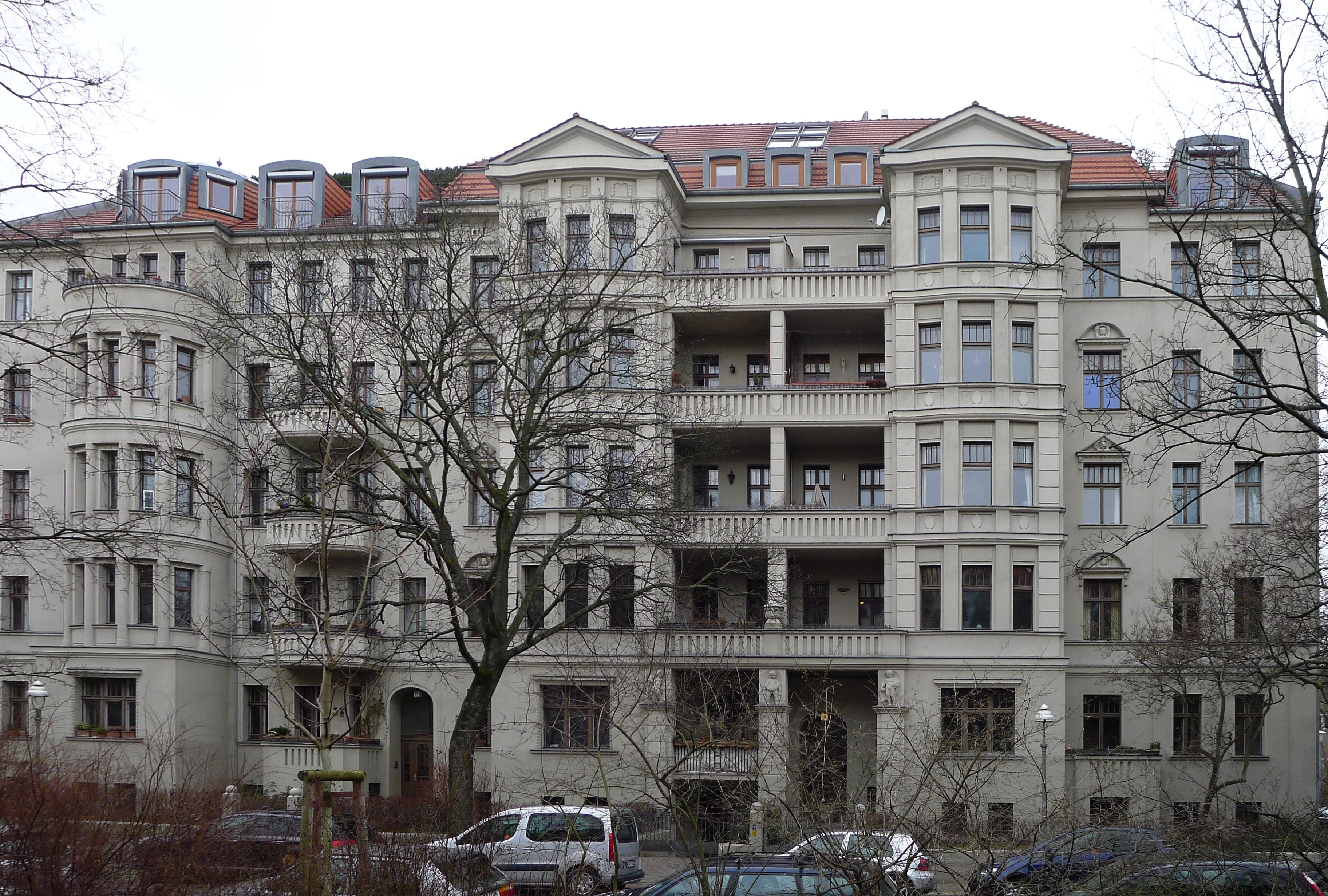 Mietshaus